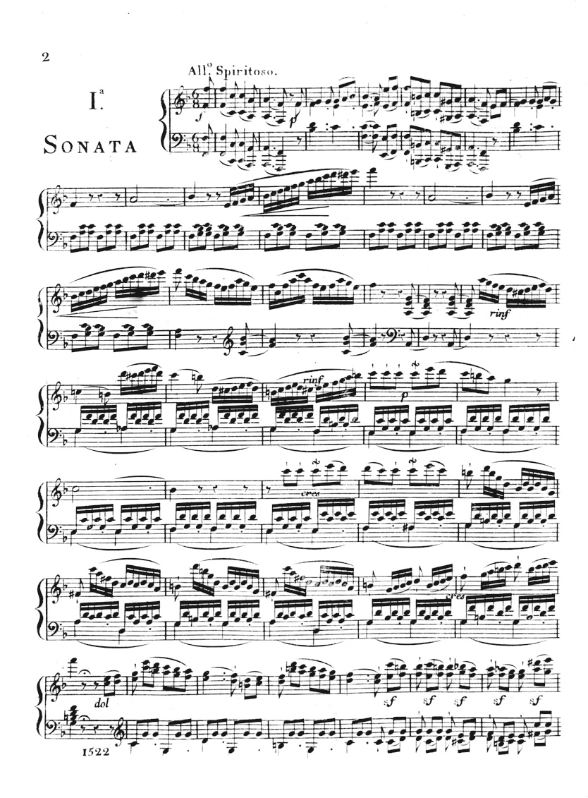 La première sonate pour clavecin extrait de l'opus 25 (1800) de Giacomo Gotifredo Ferrari, publiée à Paris chez Sieber.